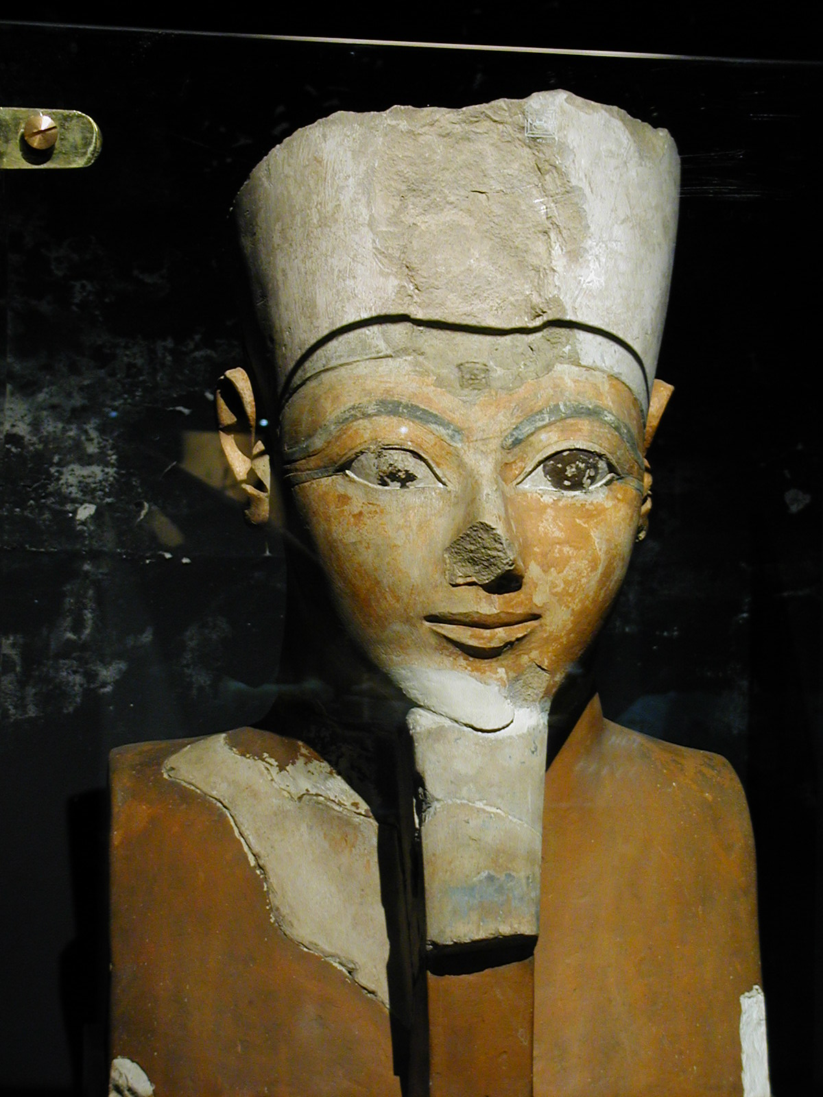 Tête d'Hatchepsout (trouvée à Louxor), Musée national, Alexandrie, Égypte).